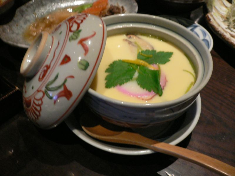 小炮點的茶碗蒸之還挺大碗的